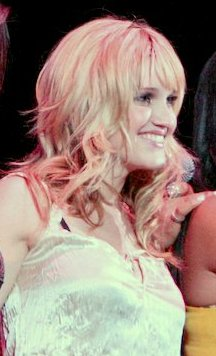 Ashley Roberts singer 2005 The Pussycat dolls